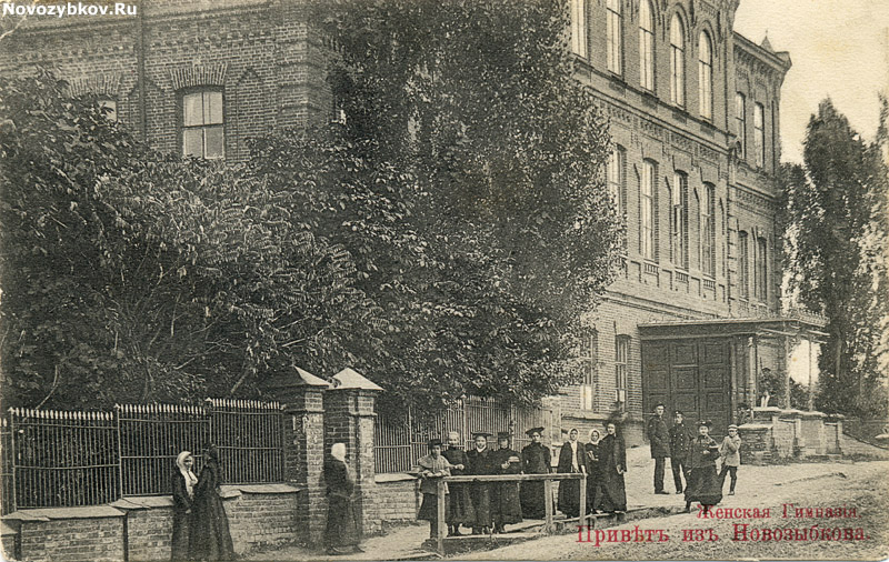 Жаночая гімназія ў Навазыбкаве